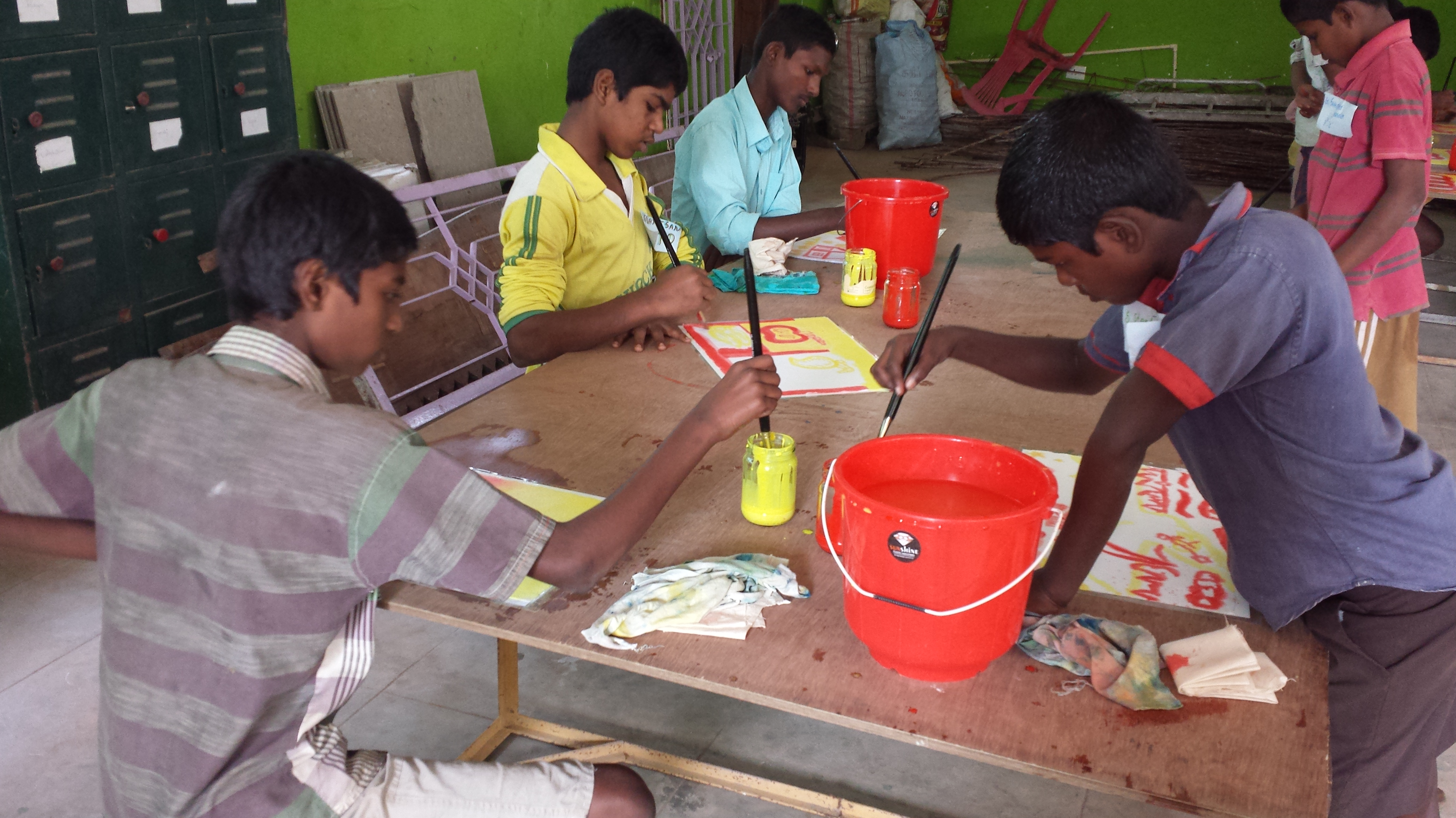 atelier peinture en 2018